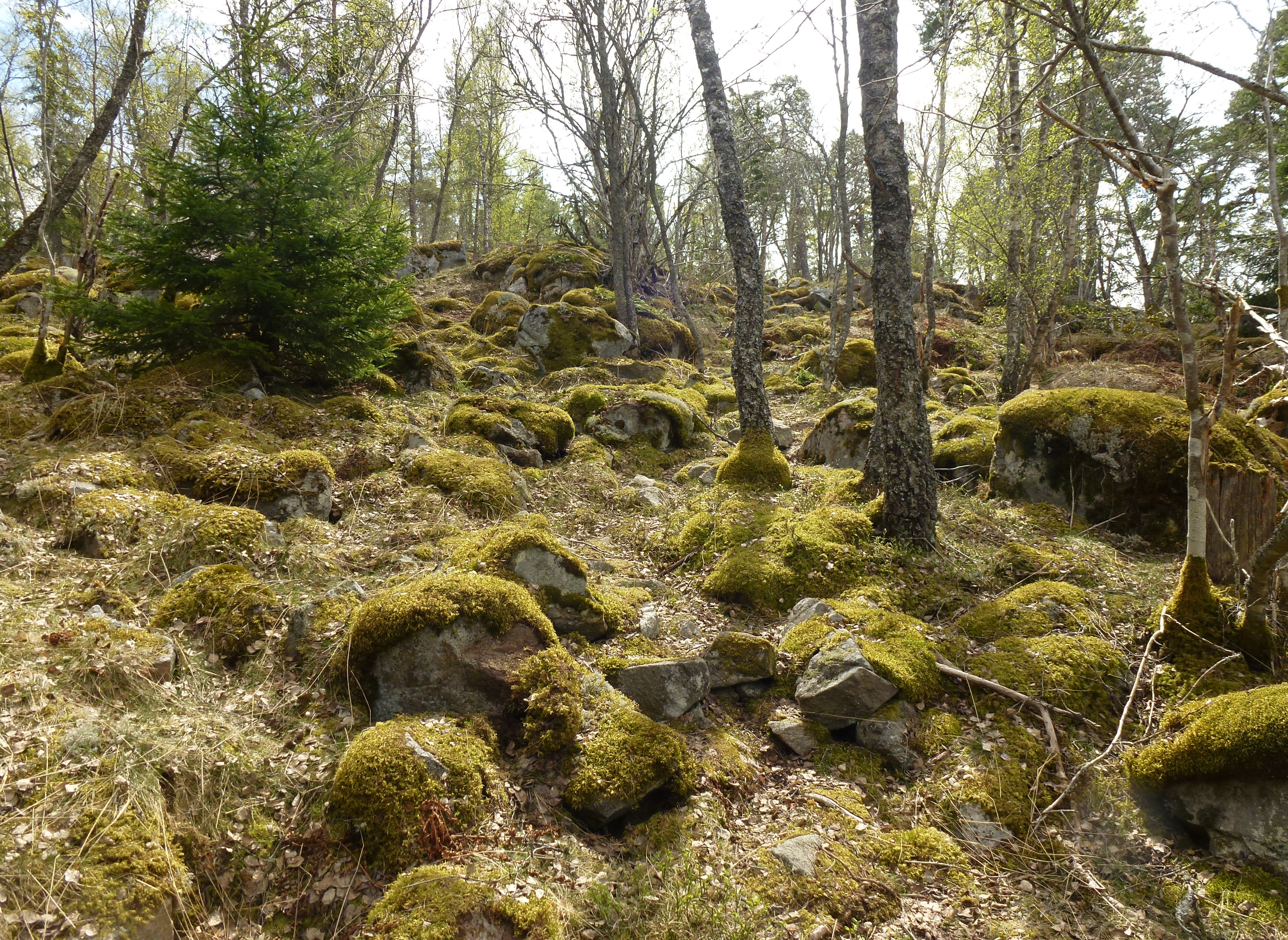 Stäketskogens naturreservat klapperstensfält